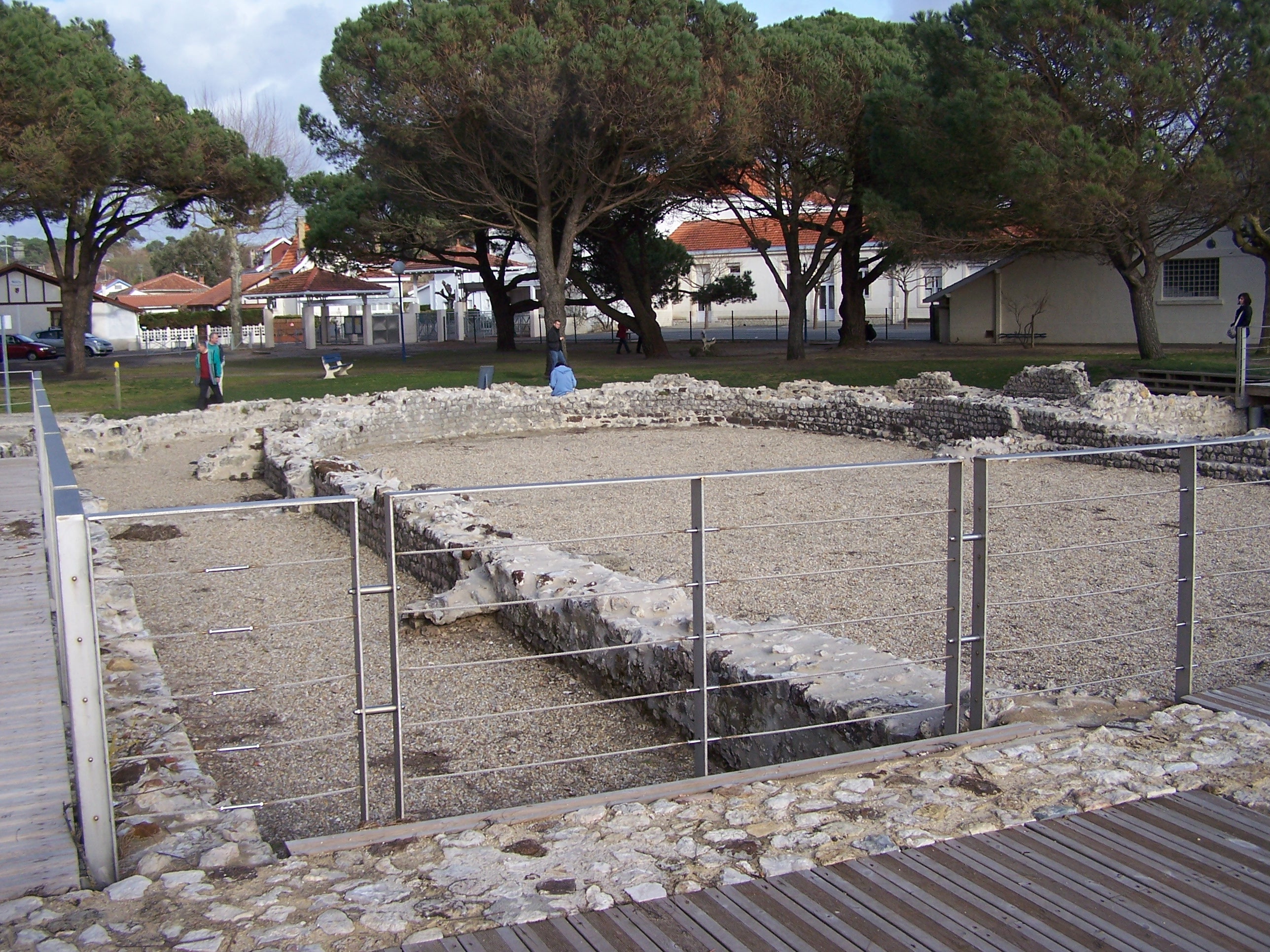 Vestiges gallo-romains à Andernos-les-Bains, Gironde, France